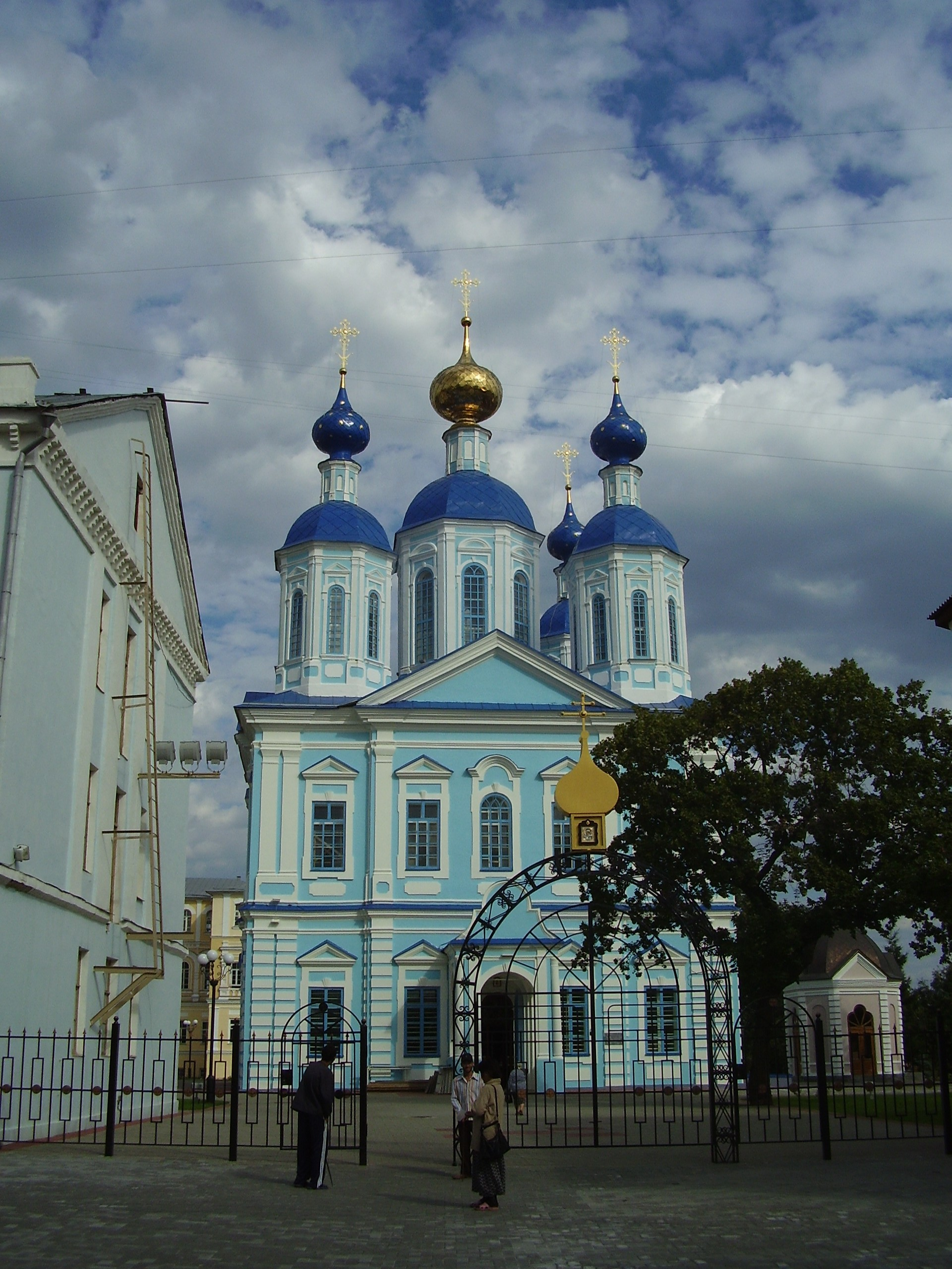 Тамбов,храм Казанской иконы Божьей Матери